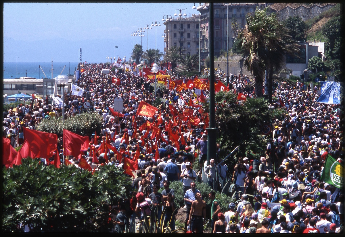 Corso Italia, manifestazione del 21 luglio 2001